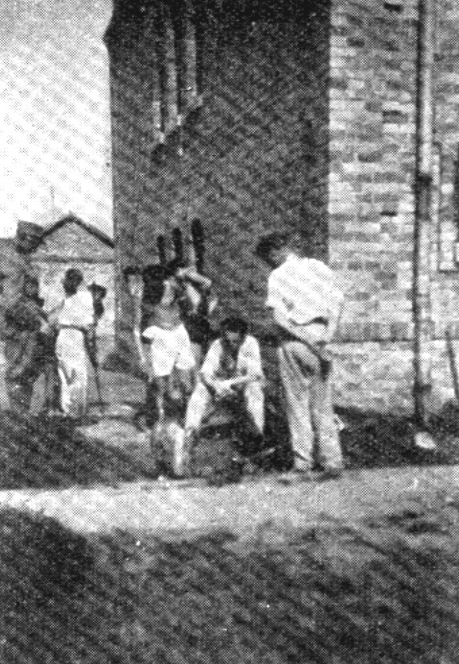 Srpskohrvatski / српскохрватски: Grupa komunista osuđenika u sremskomitrovačkoj kaznioni.